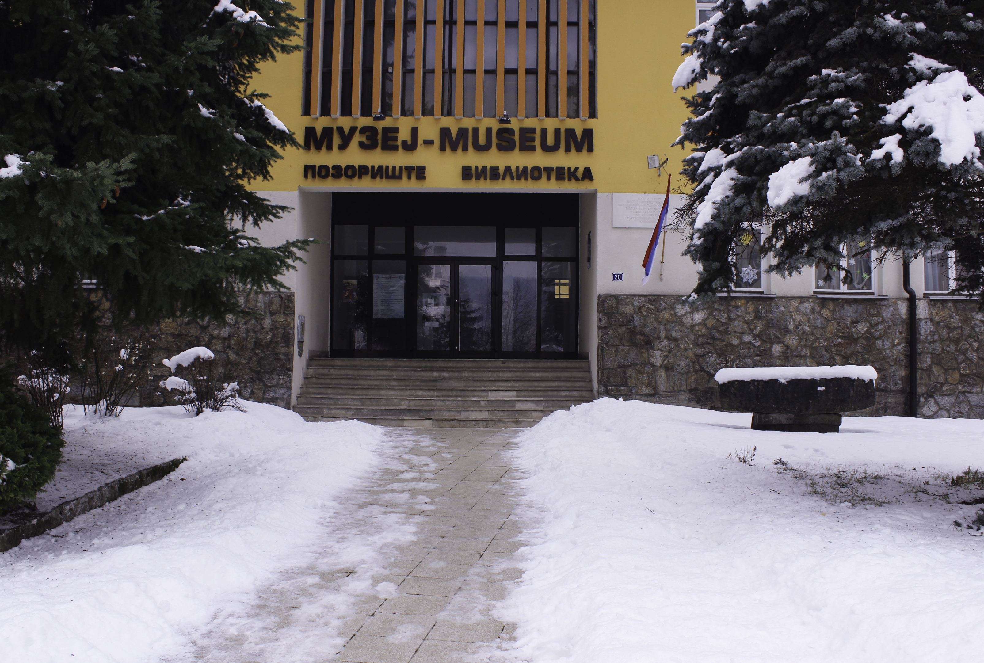 Zgrada Muzeja Stare Hercegovine Foča.